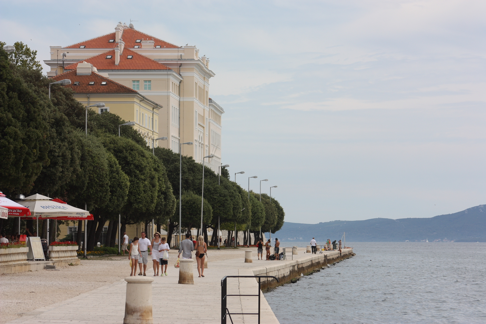 Zadar